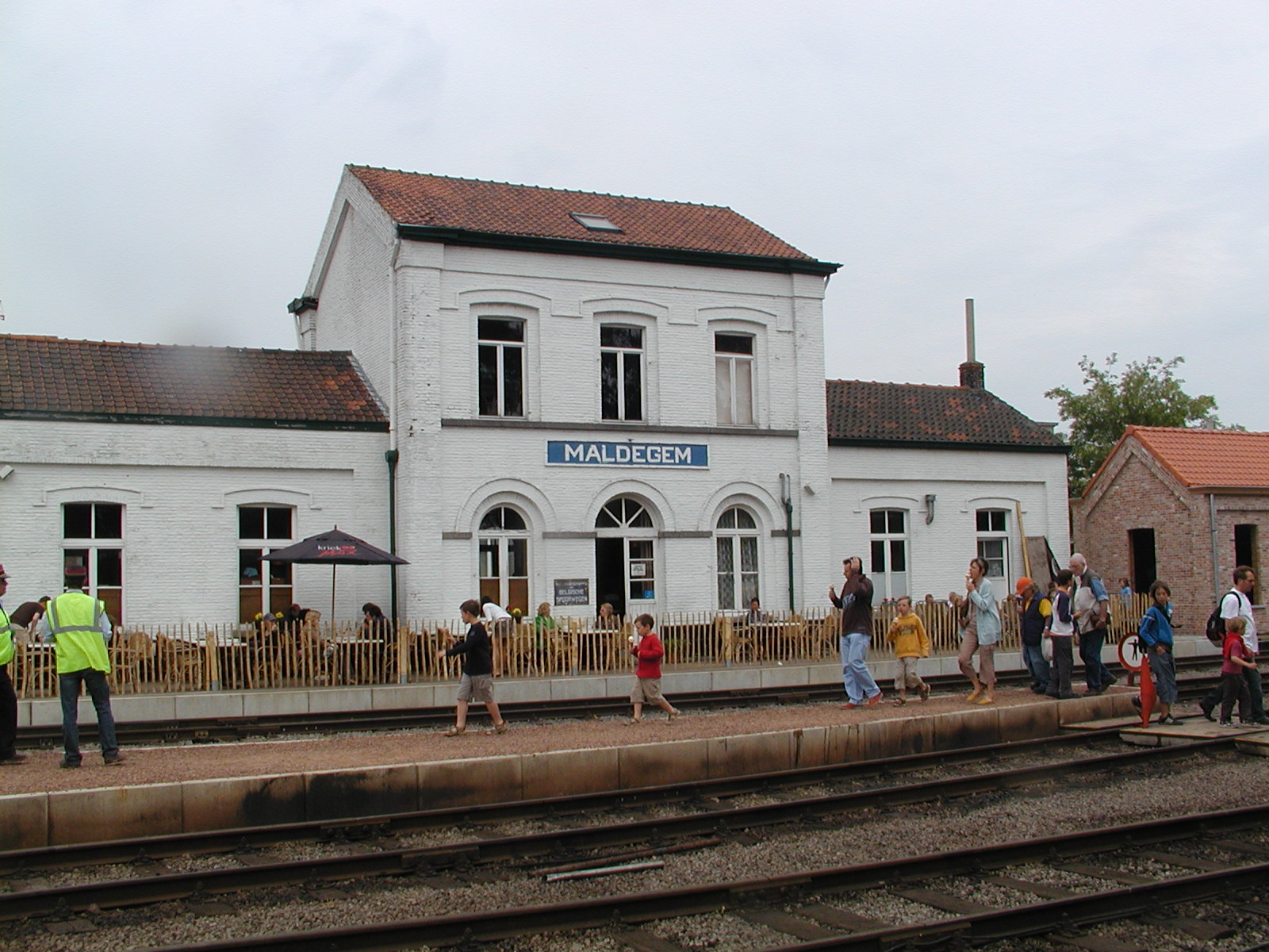 Fotis Yves Nevelsteen dum la Vaporfestivalo la 6-an de majo 2007